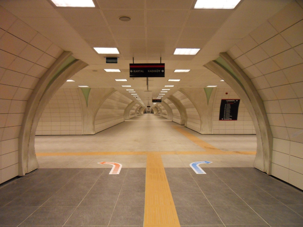 Acıbadem istasyonu peron çıkışı.